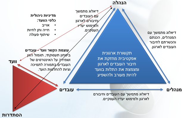 מערכת יחסי העבודה בארגון מוועד